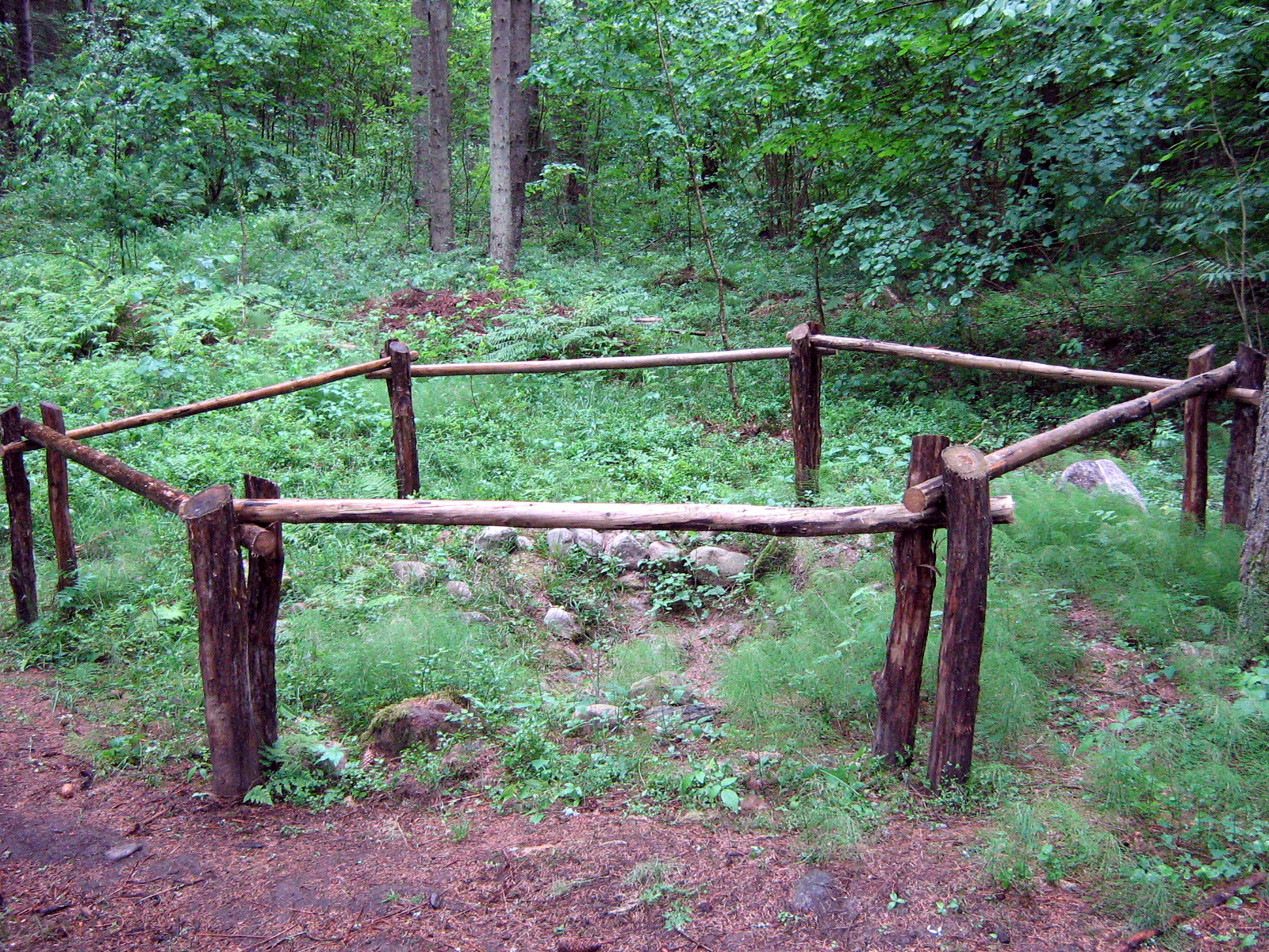 Mikytų alkakalnis, Maldų šulinys, Plungės rajonas, Žemaitijos nacionalinio parko teritorija Foto: Algirdas, 2007 m. birželio 15 d., Lietuva